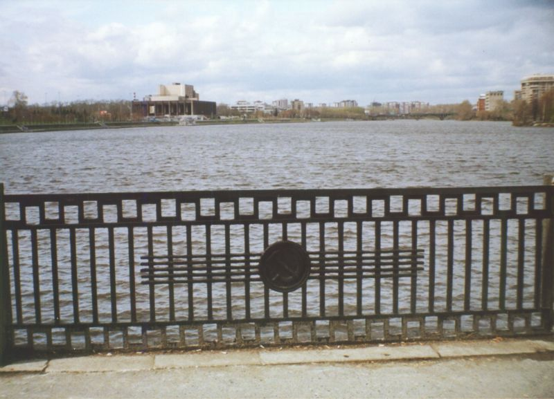 eo Akvobarajxo en rivero Isetj en Jekaterinburg (2205). ru Пруд на реке Исеть в Екатеринбурге (2005). La fonta bildo de cxi tiu bildo estas ankaux en mia propra retpagxaro [1] Mi, auxtoro de la bildo, permesas al cxiuj uzi gxin kun cxi tiuj kondicxoj